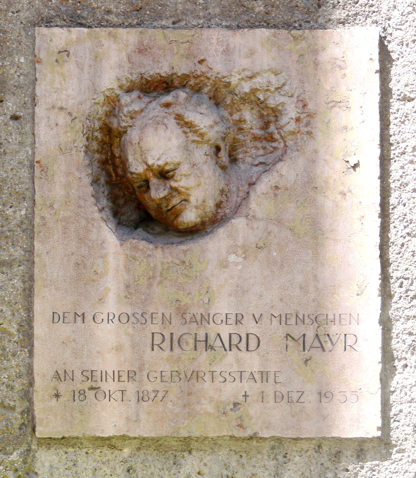 Gedenktafel am Geburtshaus von Richard Mayr, Linzer Gasse (Hotel Gablerbräu), Salzburg